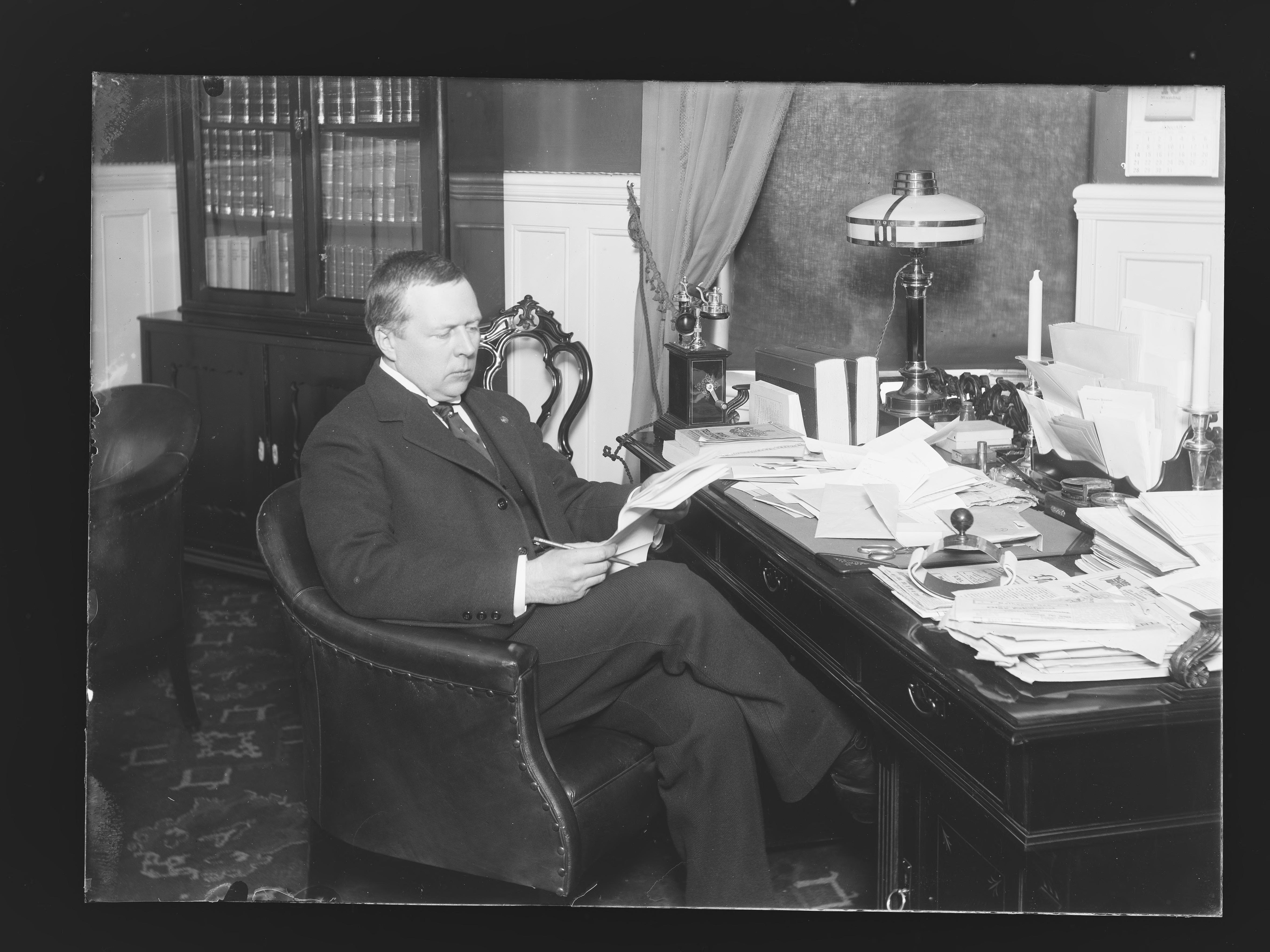 Bildet er hentet fra Nasjonalbibliotekets bildesamling. Anmerkninger til bildet var: Påskrift arkivark: Stortingspræsident Movinkel Eldste arkivnummer: 270 Oslo, Oslo Depicted person: Mowinckel, Johan Ludvig